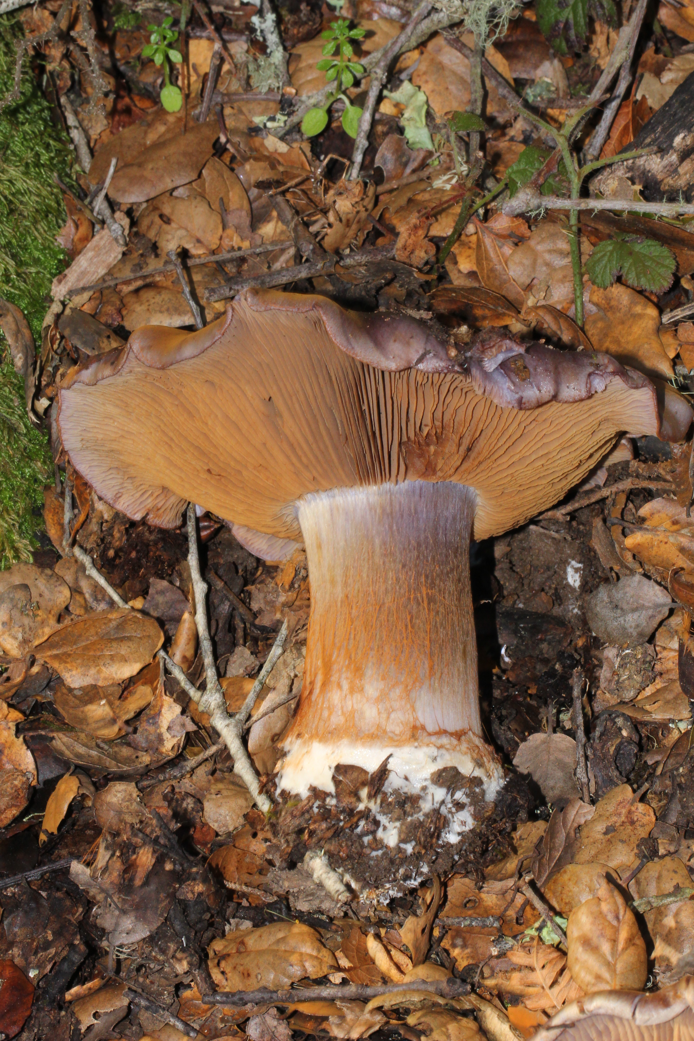 Cortinarius glaucopus fotografato in California